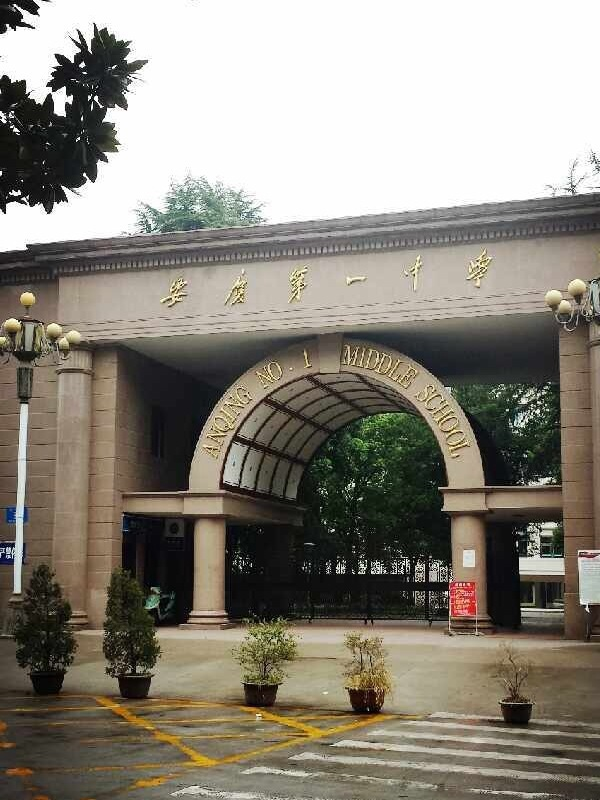 安庆一中大门